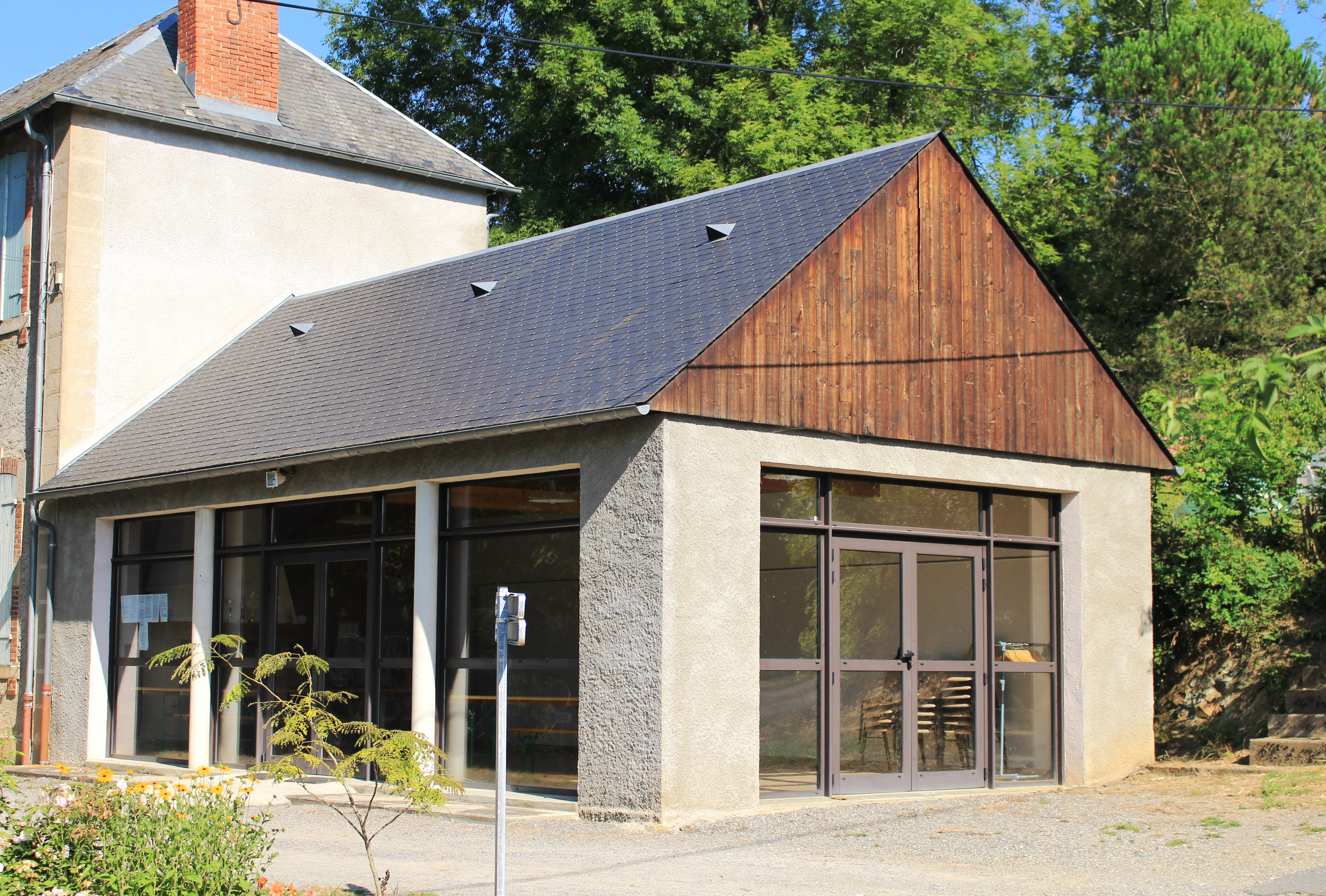 Salle des fêtes de Fréchendets (Hautes-Pyrénées)